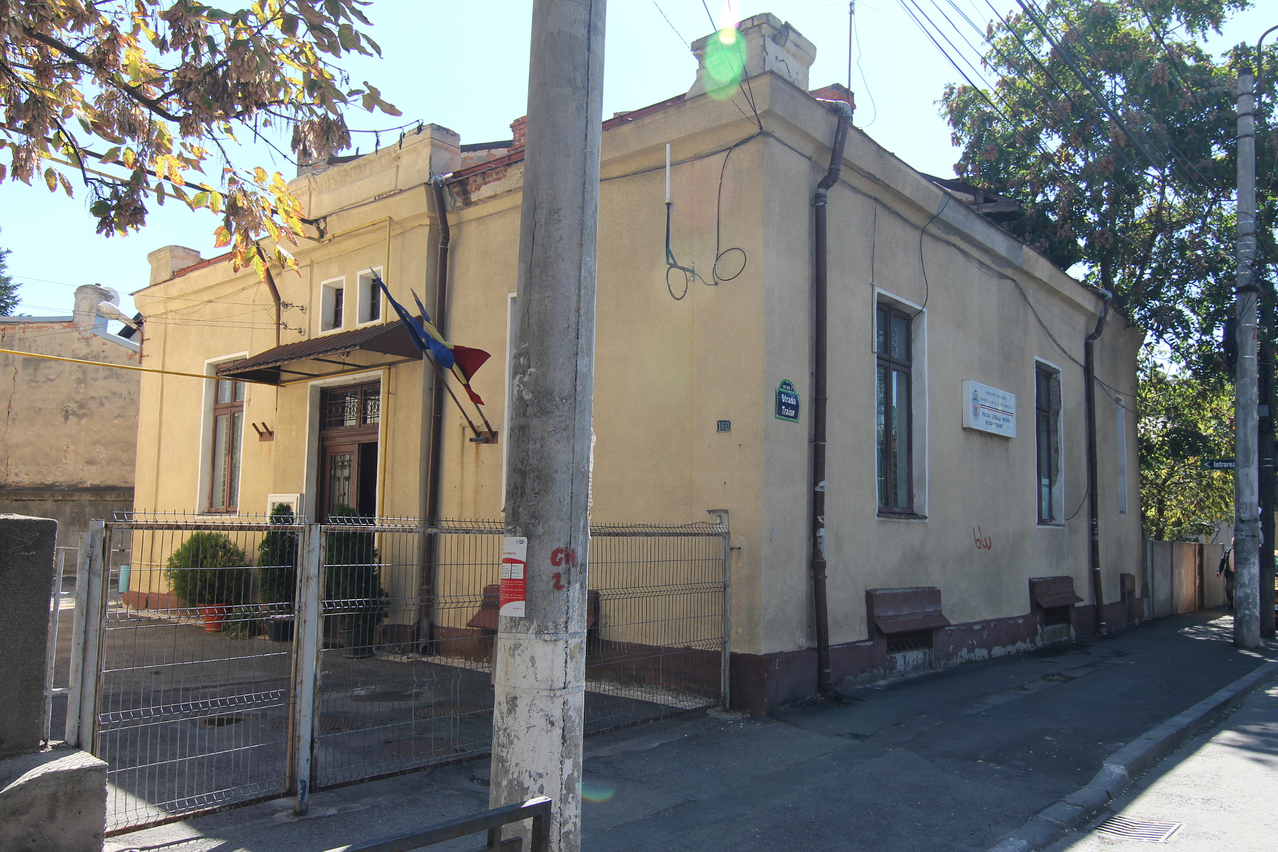 Casă pe strada Traian